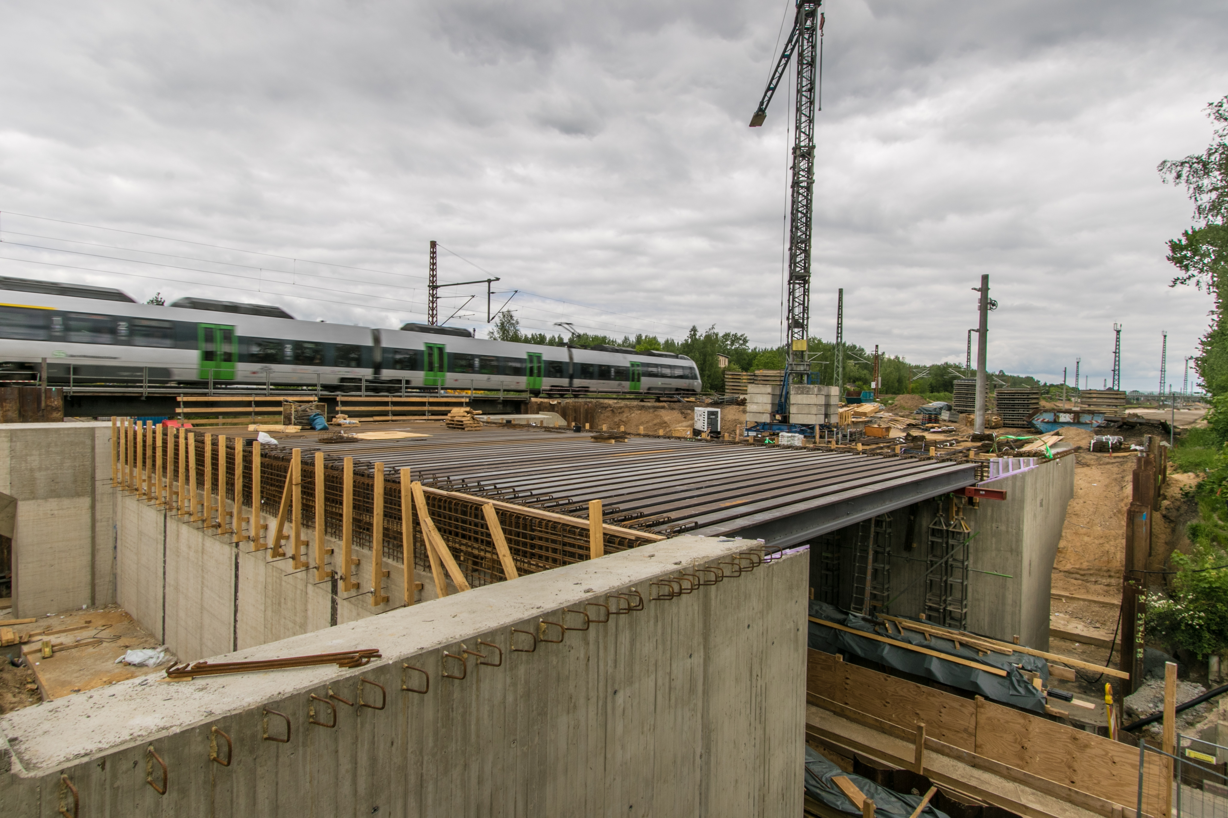 Neubau Brücke Zwenkauer Straße als Walzträger-in-Beton Brücke. Am Steg des außenliegenden Trägers sind Stegbohrungen zu erkennen, durch die eine Querbewehrung geführt wird, dazu schreibt [1] auf Seite 46, Im Gegensatz zu EC 4 erlaubt die Deutsche Bahn [DS804] bei der Berechnung von WiB-Brücken den planmäßigen Ansatz eines Flächenverbundes zwischen Stahlprofil und Beton bei biegebeanspruchten Bauteilen. In der Berechnung wird von einem vollständigen Verbund zwischen Stahlprofil und Beton ausgegangen und der Querschnitt plastisch bemessen. Durch die genaue Vorgabe zur Querschnittsgeometrie und einem maximalen Trägerabstand von 70 cm wird erreicht, dass die zu übertragende Längsschubkraft klein bleibt. Des Weiteren wird vorgeschrieben, die Querbewehrung durch Stegbohrungen zu führen, sodass eine zusätzliche Verdübelung vorhanden ist.